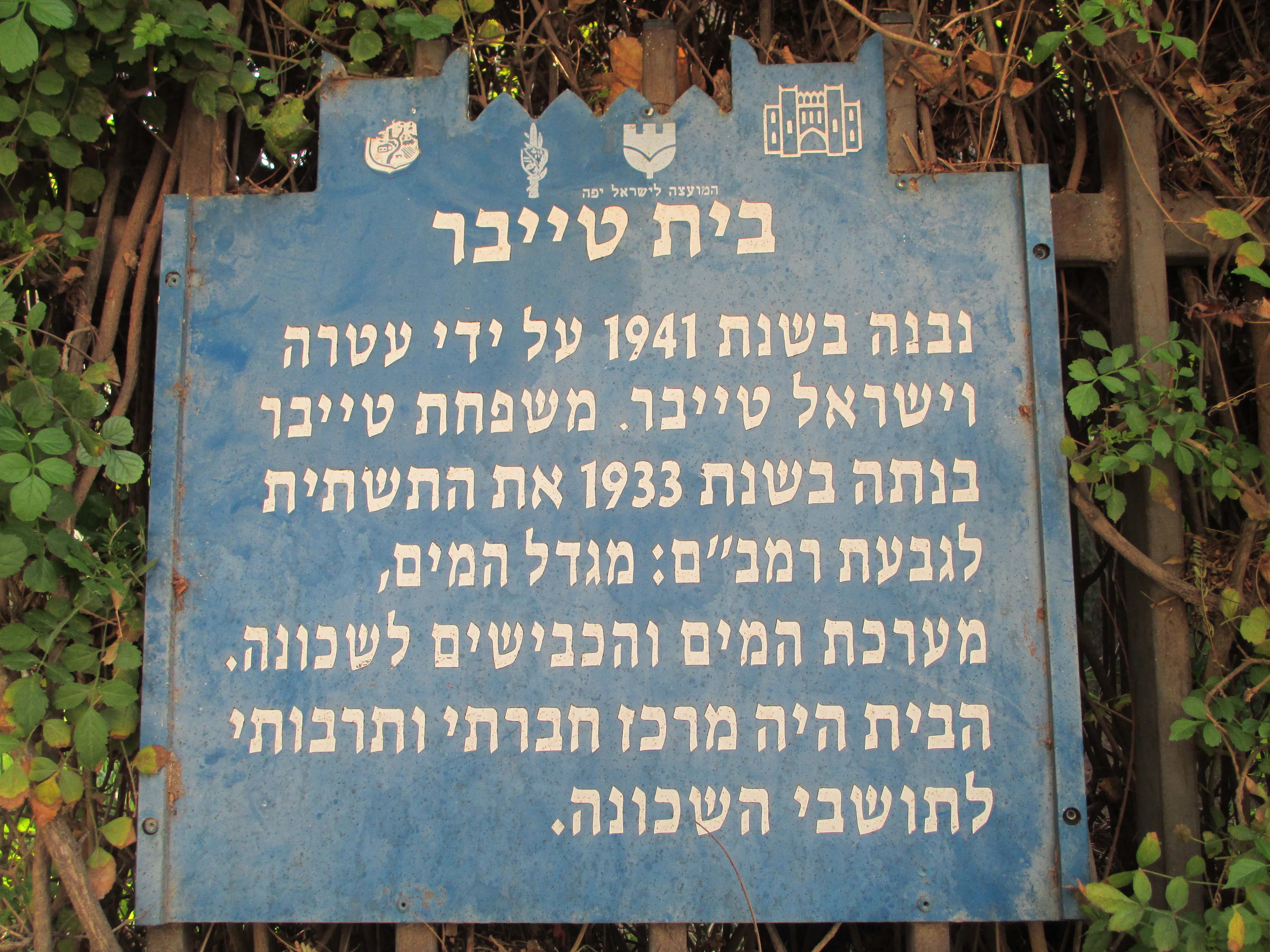 שלט הסבר בכניסה לבית טייבר בגבעת רמב"ם